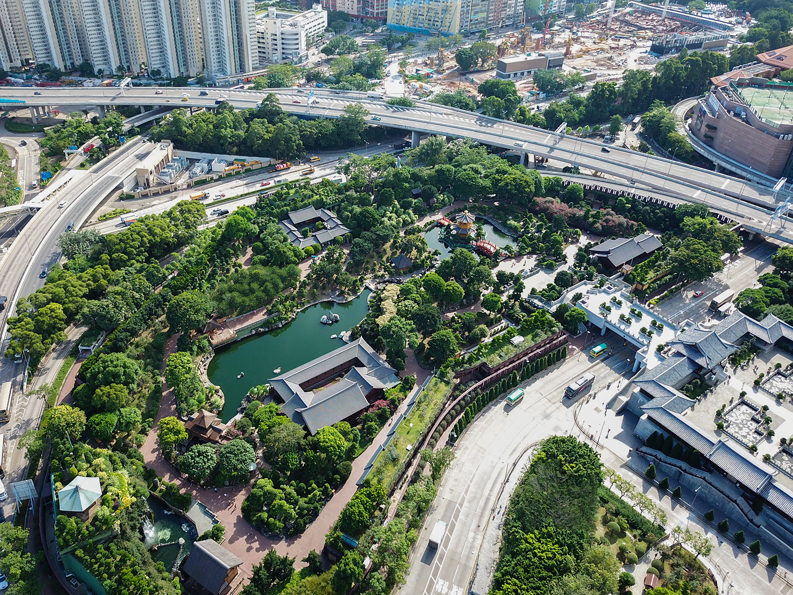 Nan Lian Garden Overview